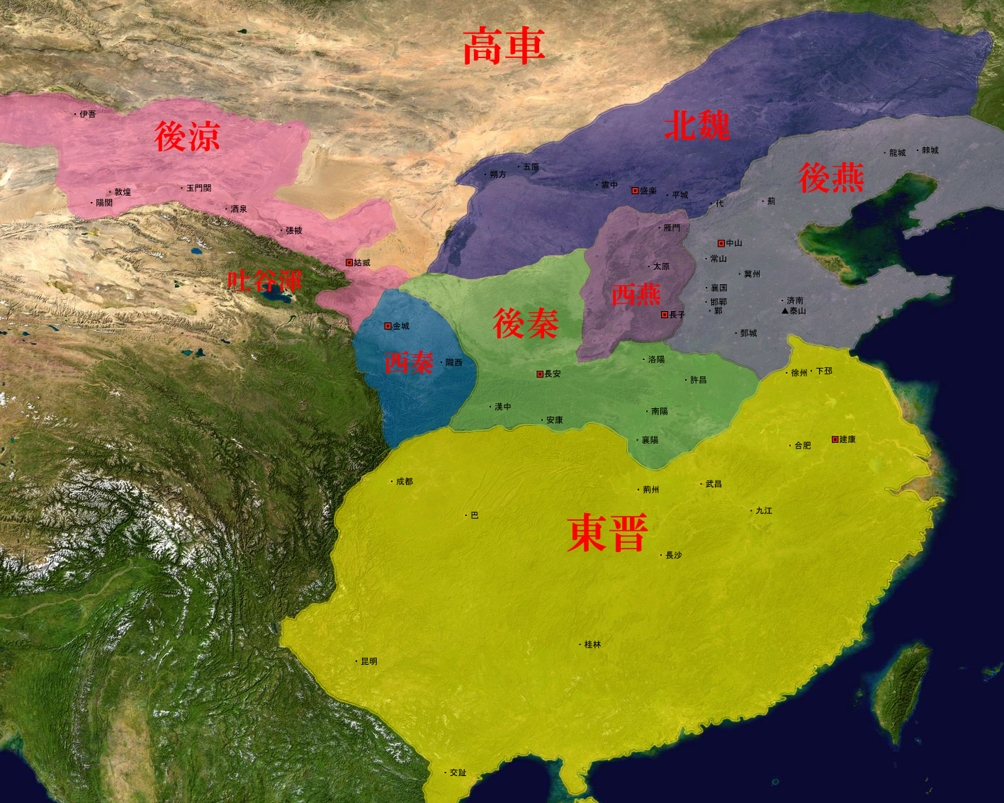 五胡十六国時代の後涼、西秦、後秦、後燕、西燕、北魏、東晋の領域。